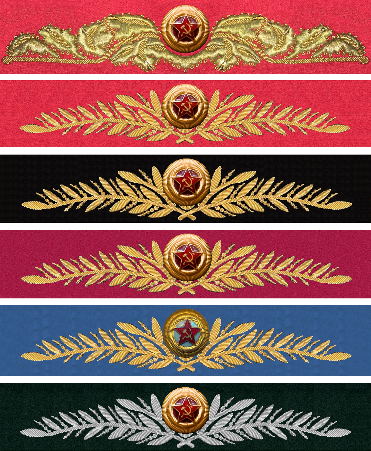 шитье генералов